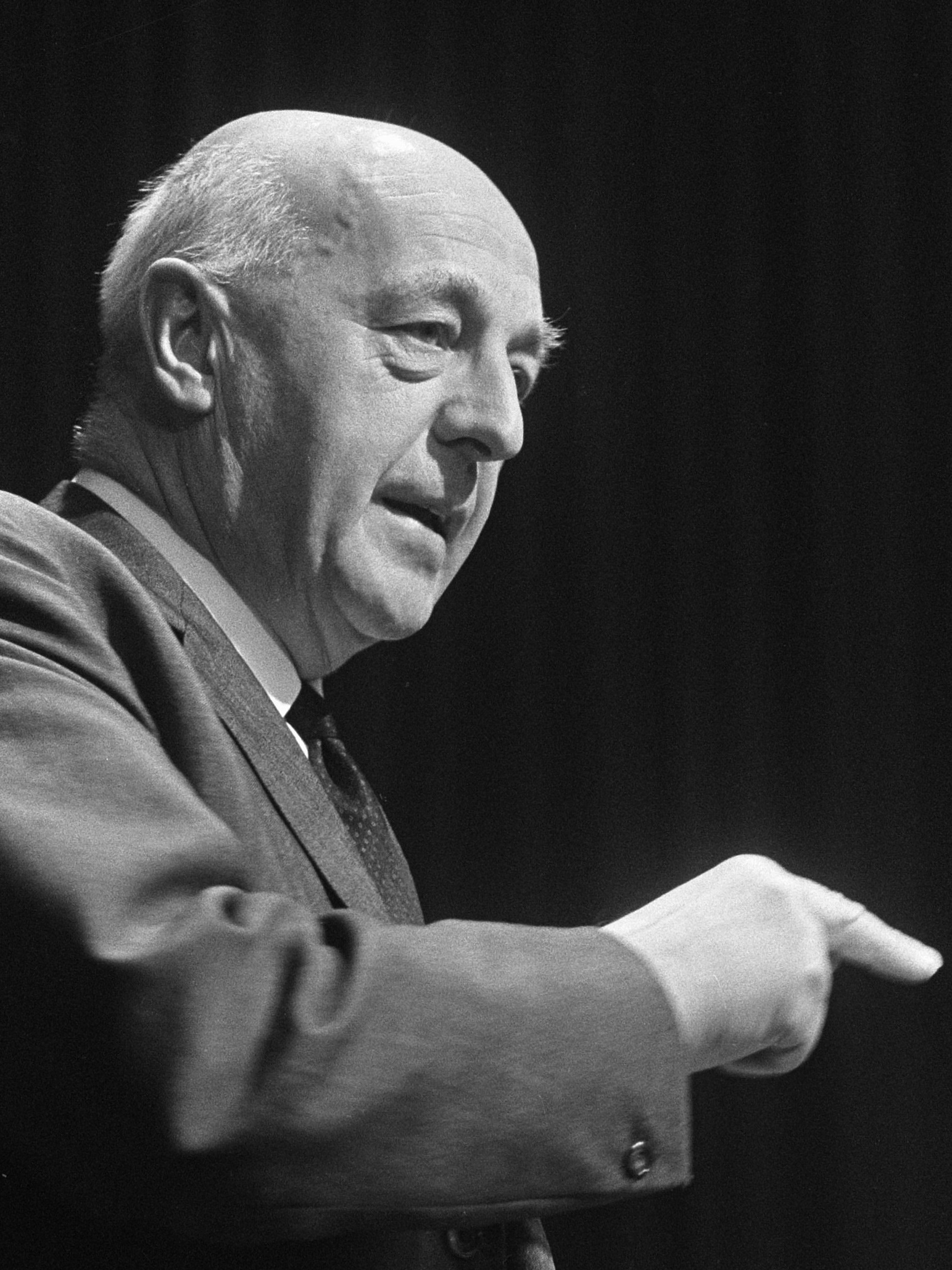 Congres PVDA in RAI; dr. Mansholt aan het woord